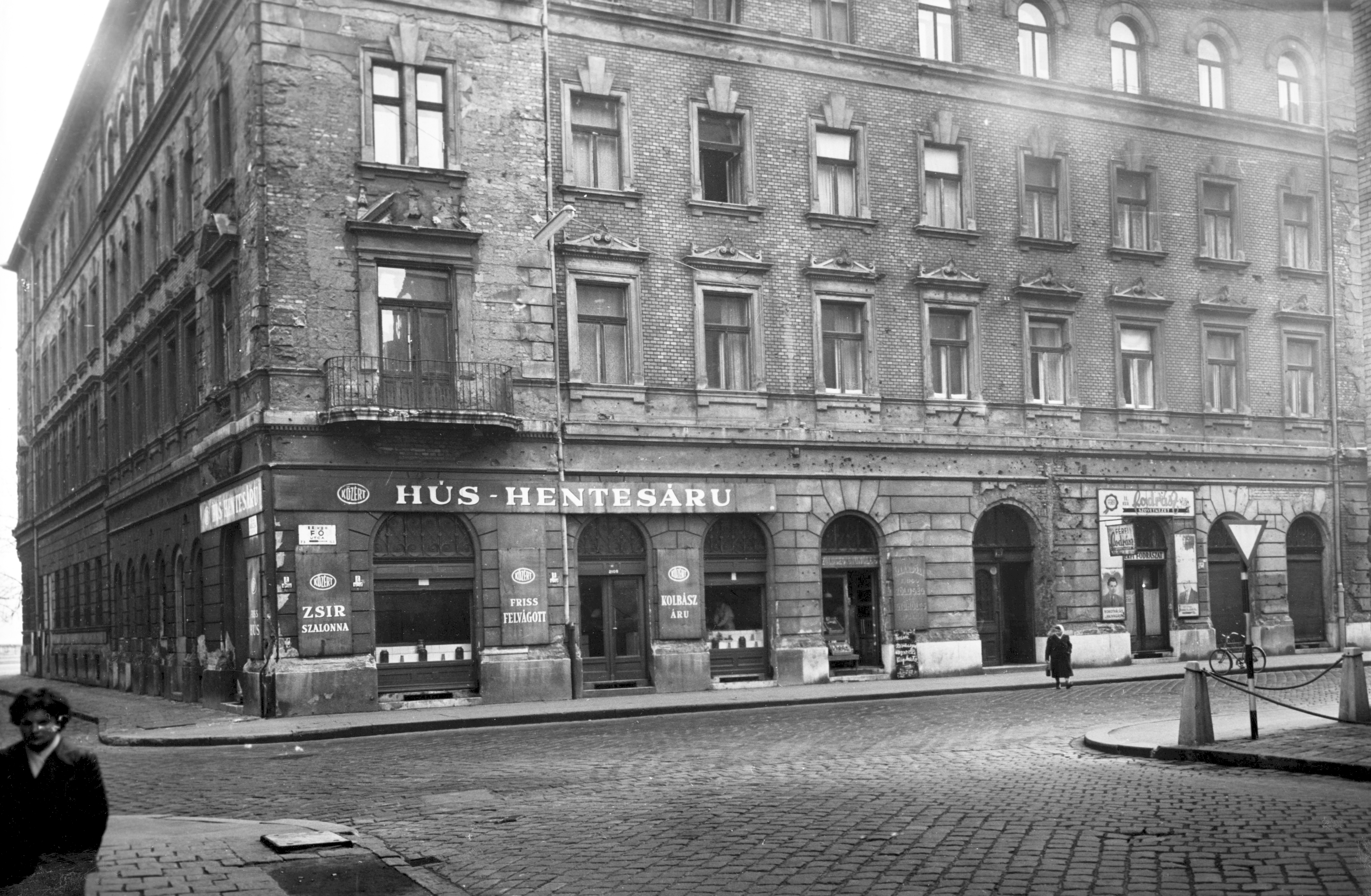 Fő utca 73. a Kacsa utcai kereszteződésnél. Budapest Location: Hungary, Budapest II. Tags: Budapest Title: Fő utca 73. a Kacsa utcai kereszteződésnél.